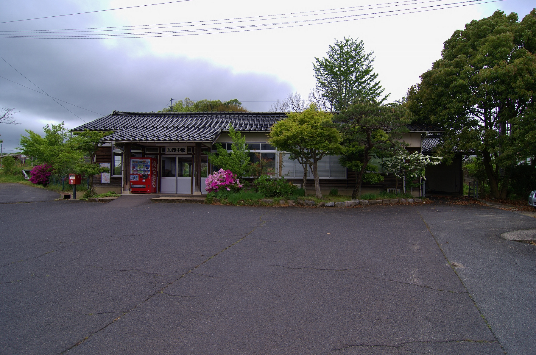 西日本旅客鉄道株式会社木次線加茂中駅